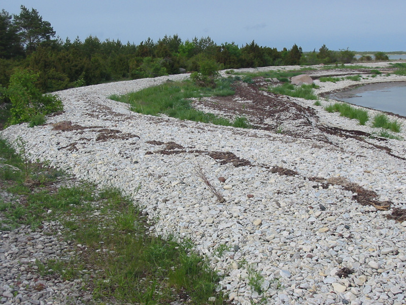 Klibuvall Kassaril